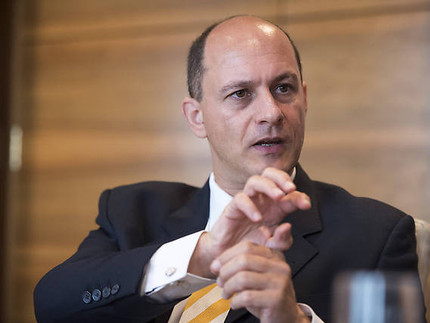 Key Pousttchi beim Fujitsu/E-3 Roundtable zur Digitalen Transformation